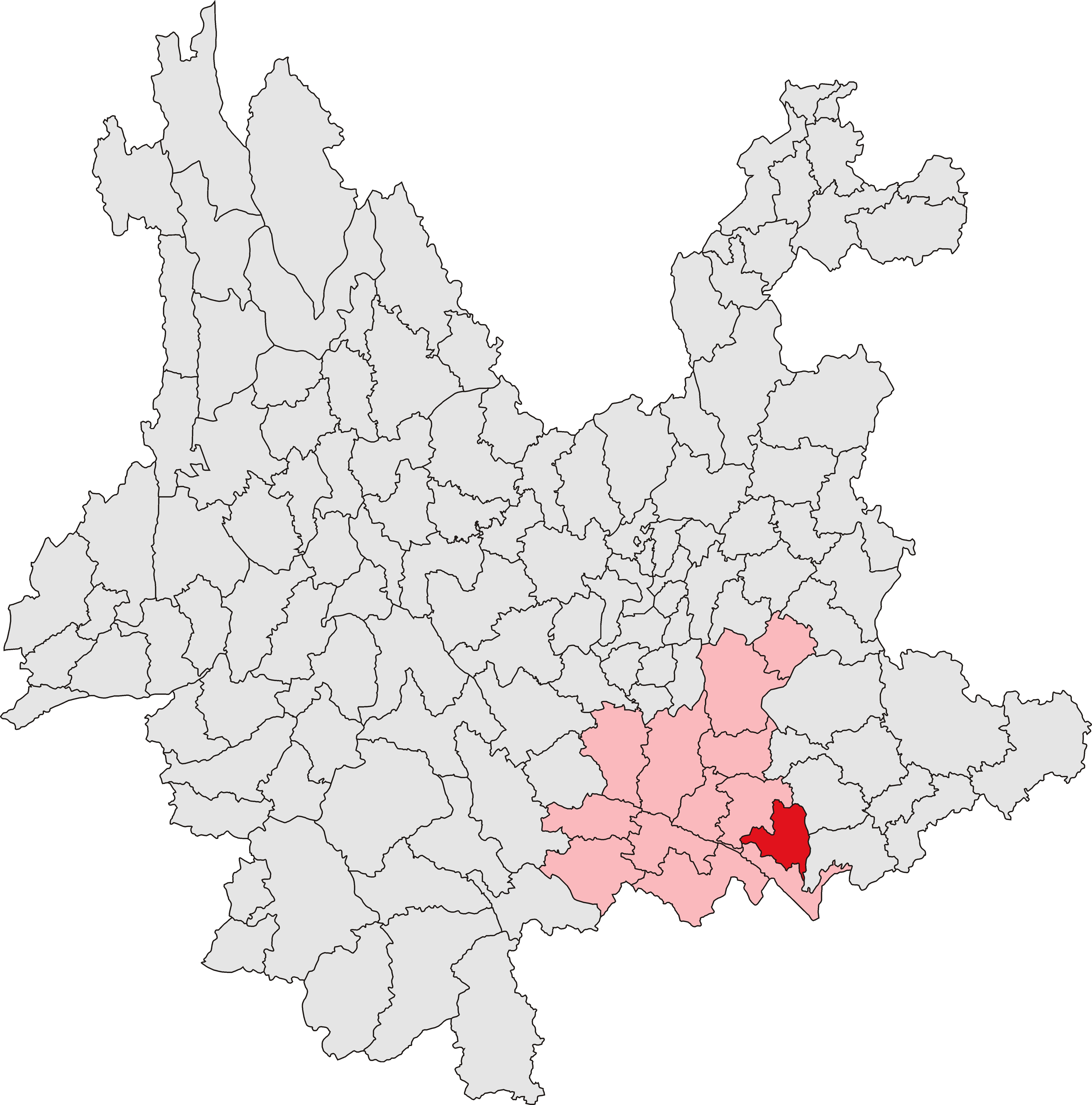 中文（中国大陆）: 屏边苗族自治县位置图